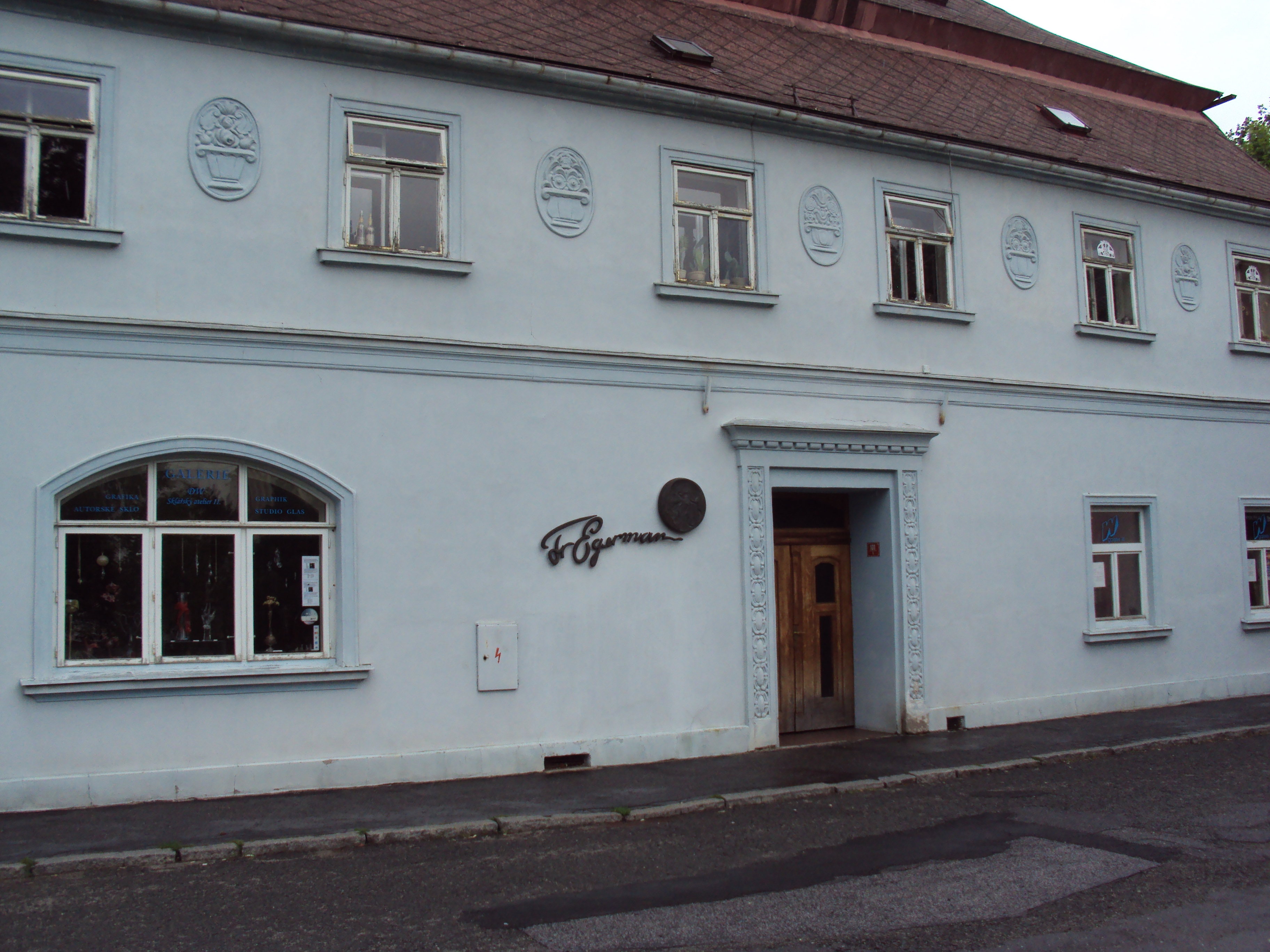 Galérie sklárny Egermann na nám.Míru v Novém Boru